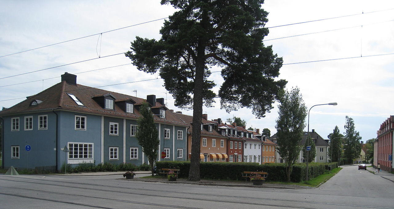 Smedslättstorget, Bromma, Stockholm. Husen ligger i kvarteret Paddan vid Smedsättstorget 43-55.